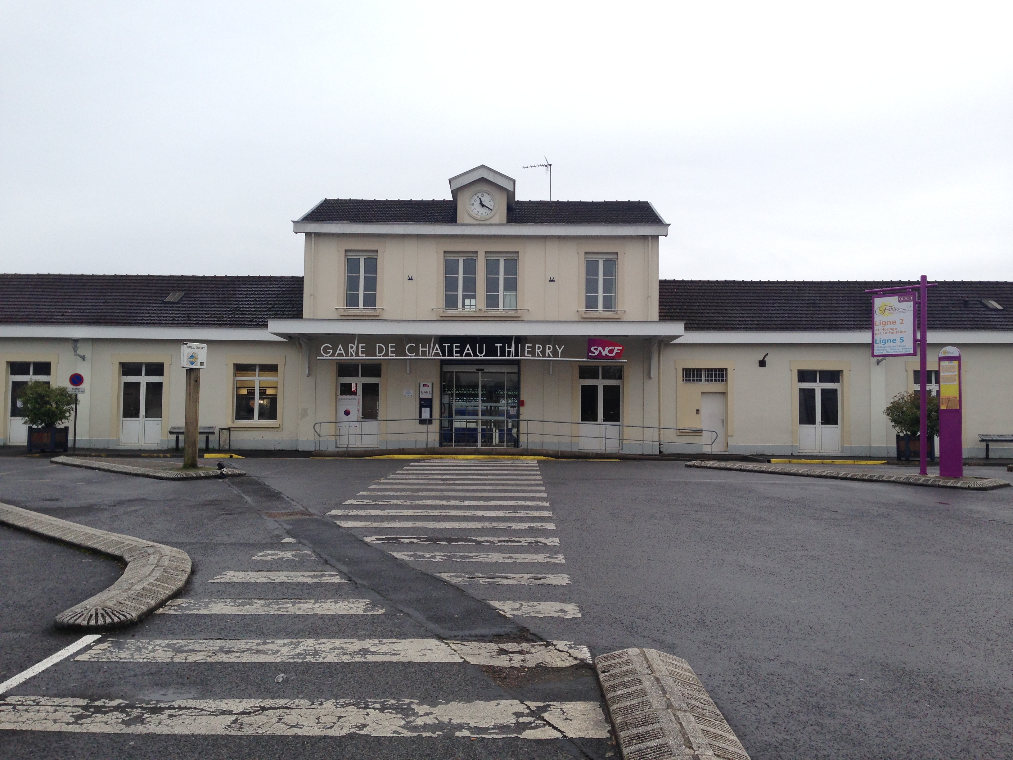 Gare de Château-Thierry (2016)